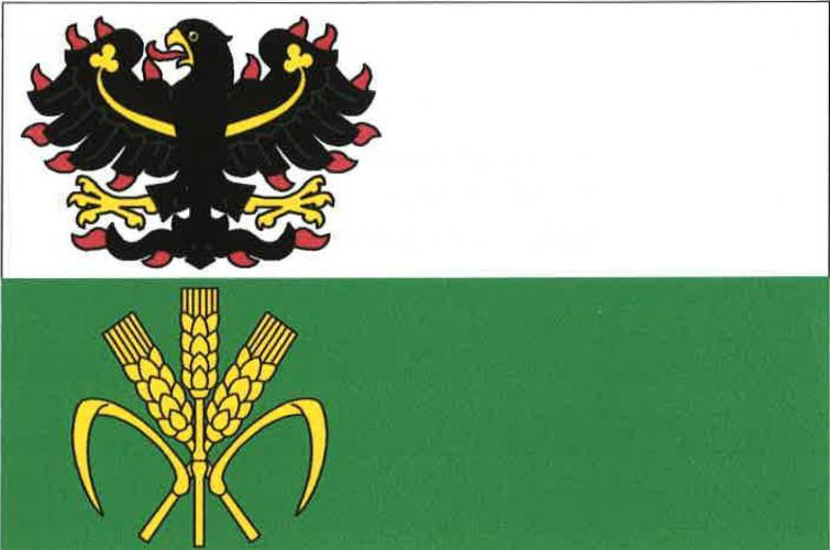 Václavice vlajka